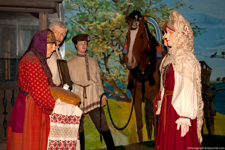 Инсталляции старинных русских обрядов, Историко-краеведческий музей им. П. В. Алабина в Самаре